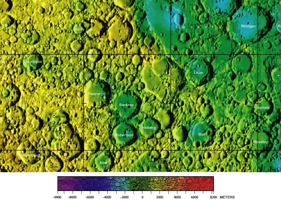 Cráter lunar Parenago. Localización. (Imagen LRO)